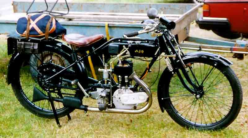 AJS